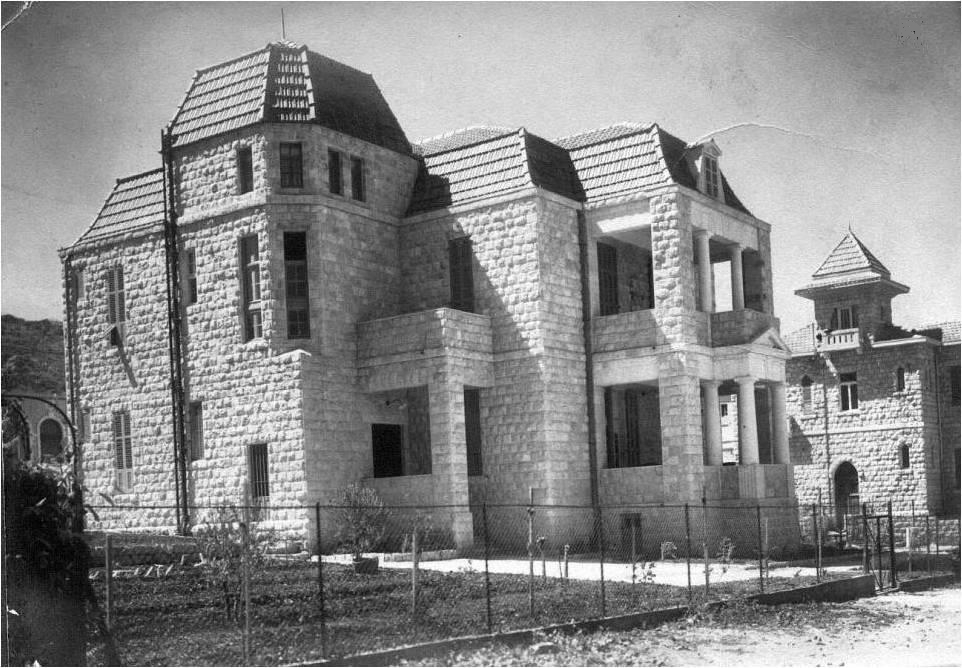 בית שמואל סגל בהדר הכרמל